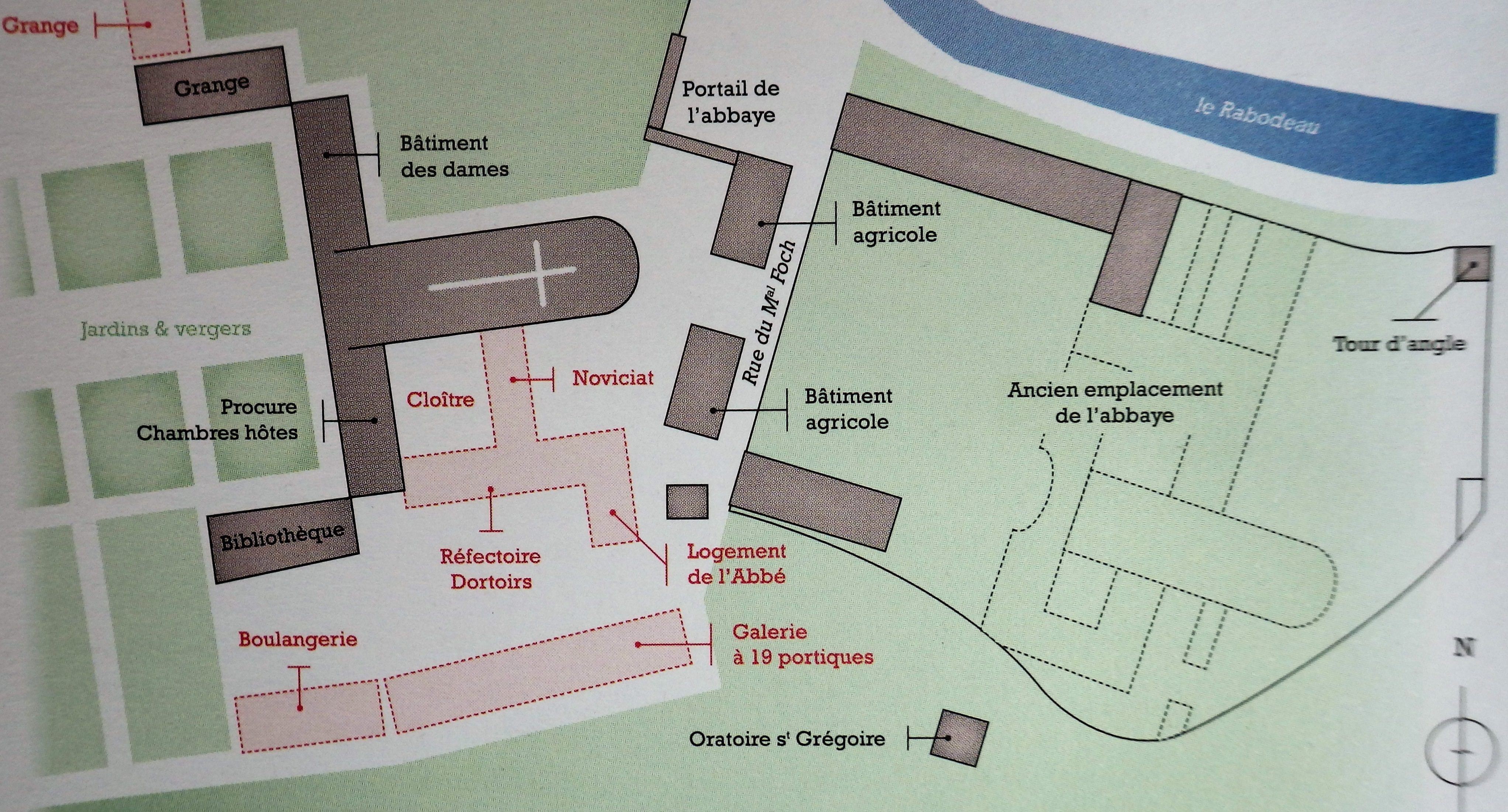 Plan actuel de l'abbaye (la 3ème abbaye actuelle du XVIIIème siècle, à gauche ; la 2ème abbaye détruite au XVIIIème siècle, à droite)